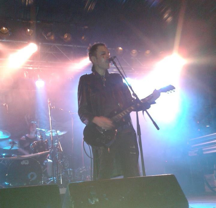 Liveauftritt der Band Nim Vind in München